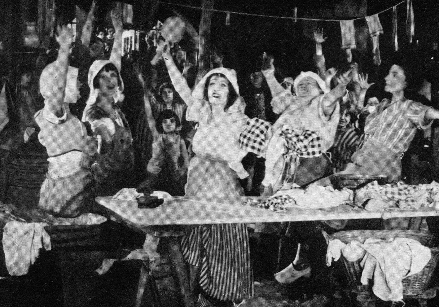 Madame sans gene - regia di Léonce Perret - foto di scena Gloria Swanson - 1924